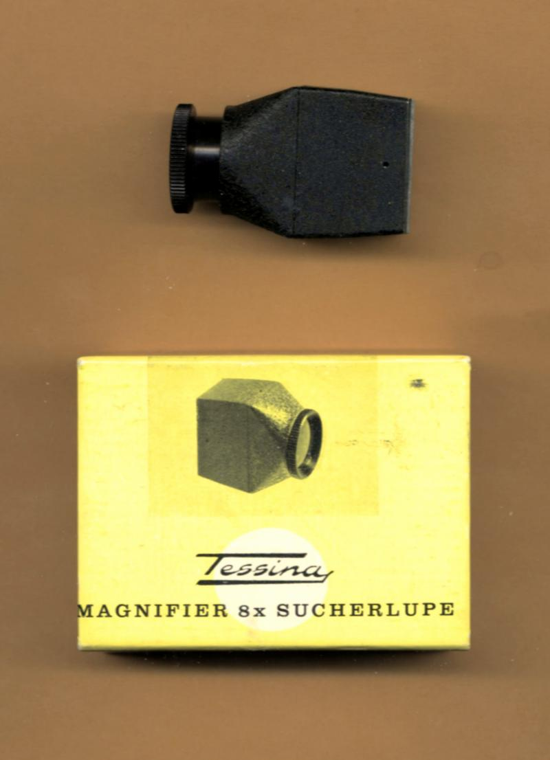 Tessina 8x magnifier